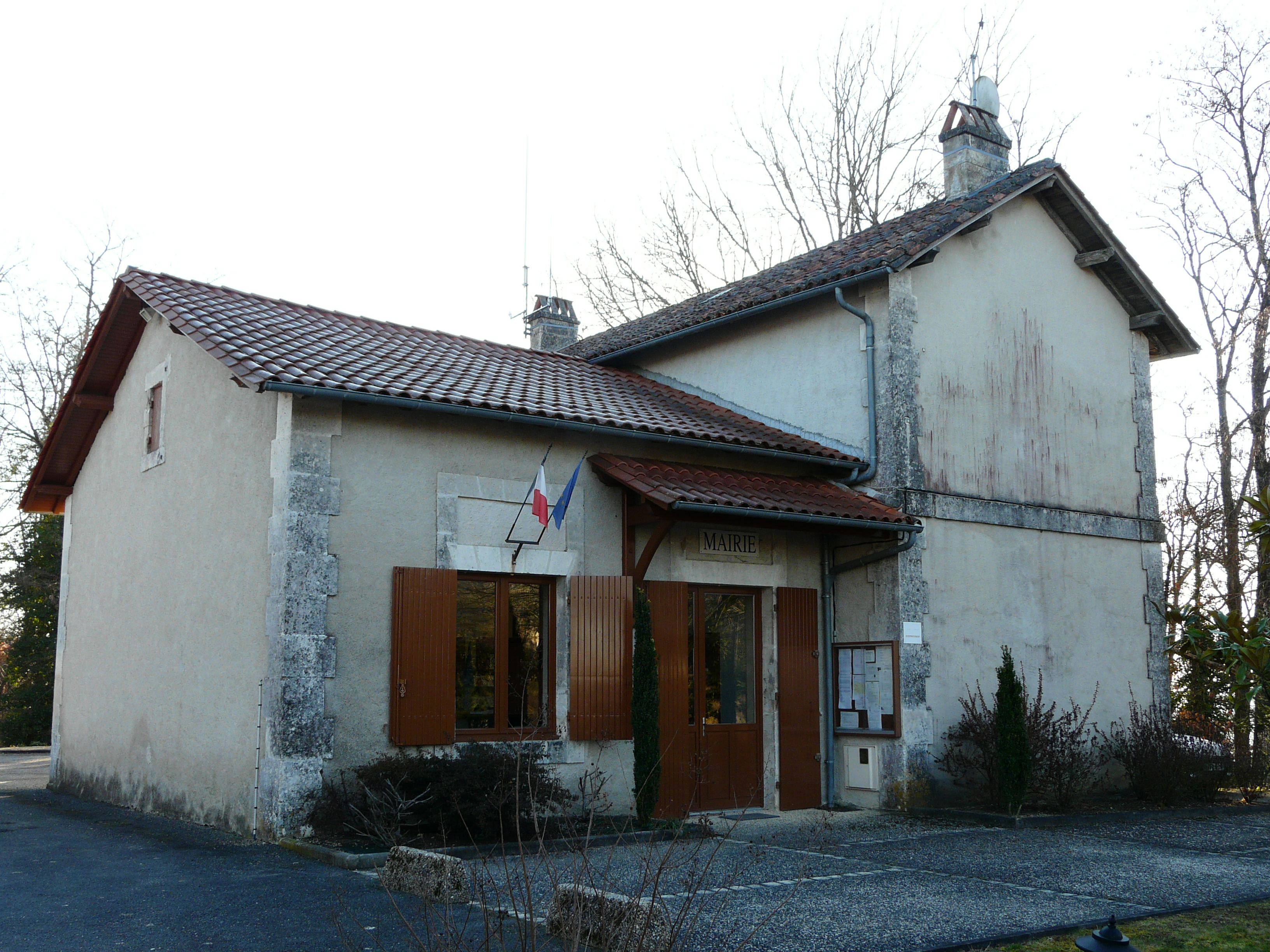 La mairie de Cantillac,Dordogne, France.